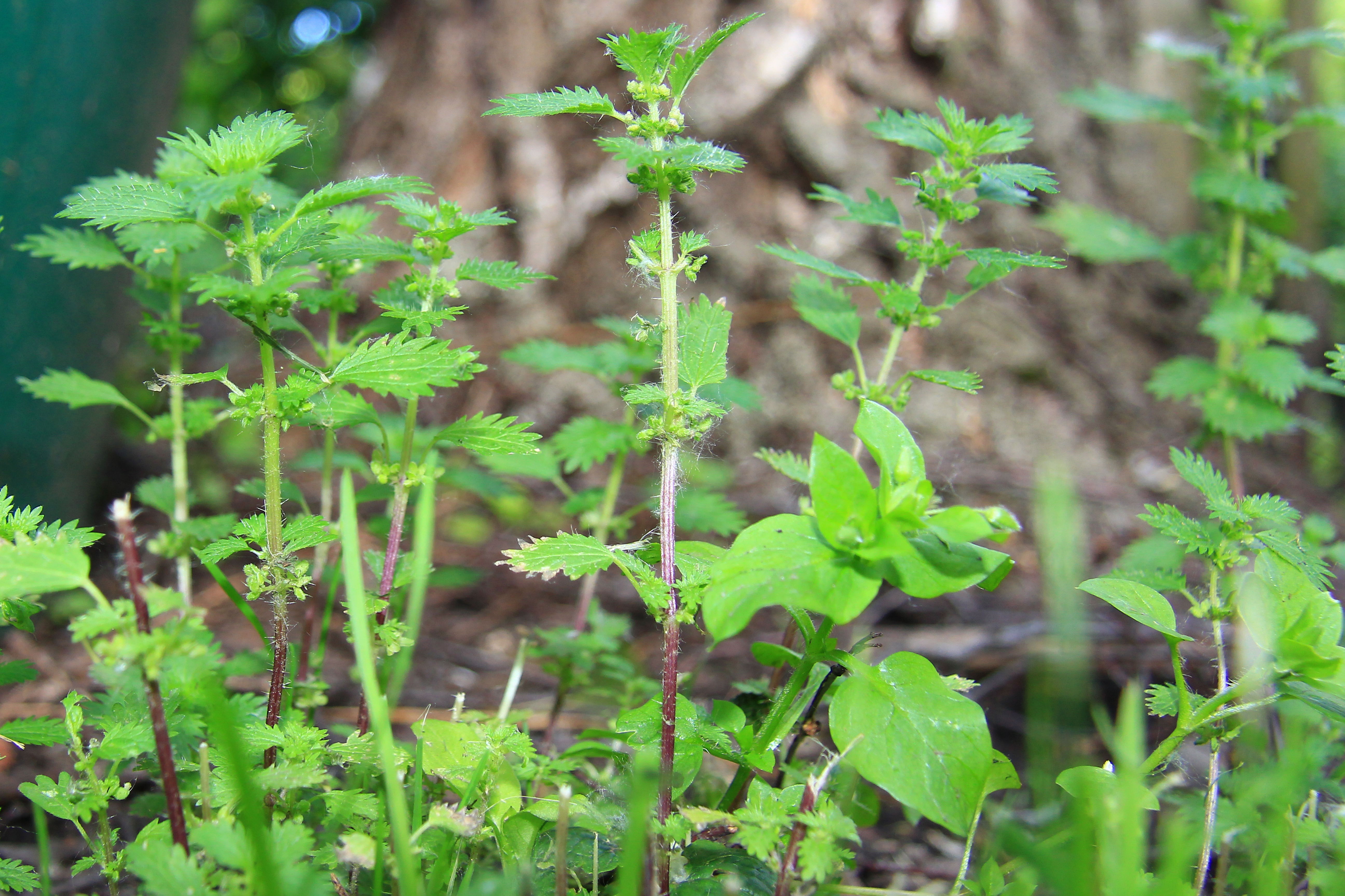 Kleine Brennnessel